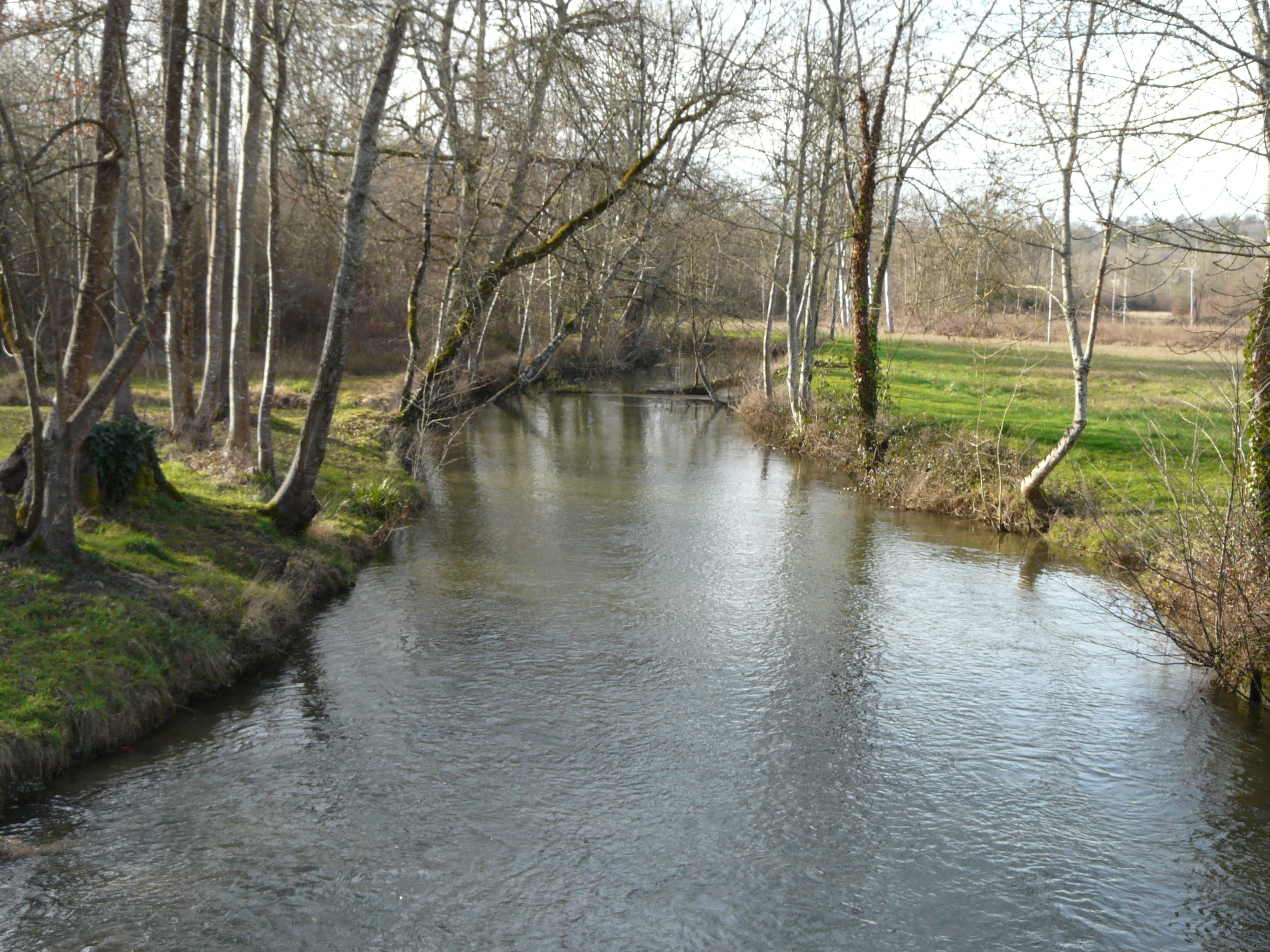 La Nizonne en amont du pont, entre Combiers (route départementale 25, Charente, à gauche) et La Rochebeaucourt-et-Argentine (route départementale 87, Dordogne, à droite). Vue prise en direction de l'aval.